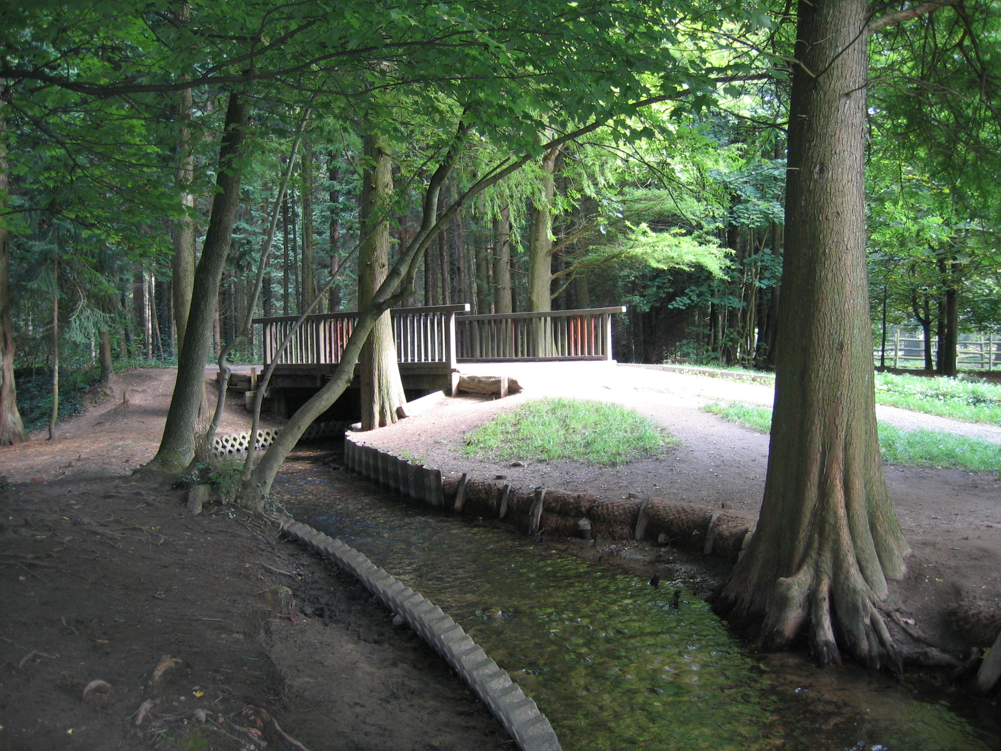 Mutzbach im Dünnwalder Wald